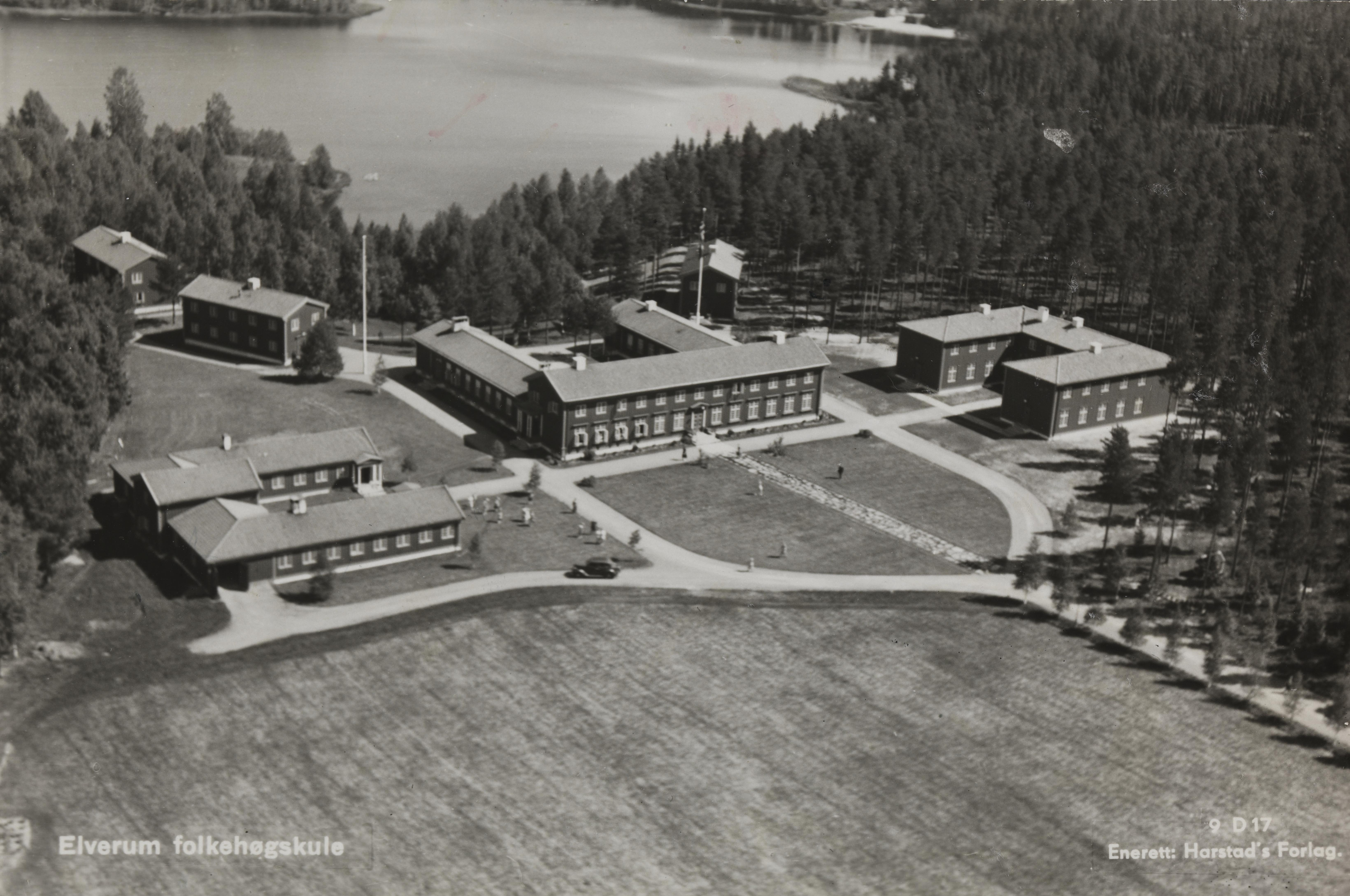 Bildet er hentet fra Nasjonalbibliotekets bildesamling Elverum folkehøgskole, Elverum, Hedmark